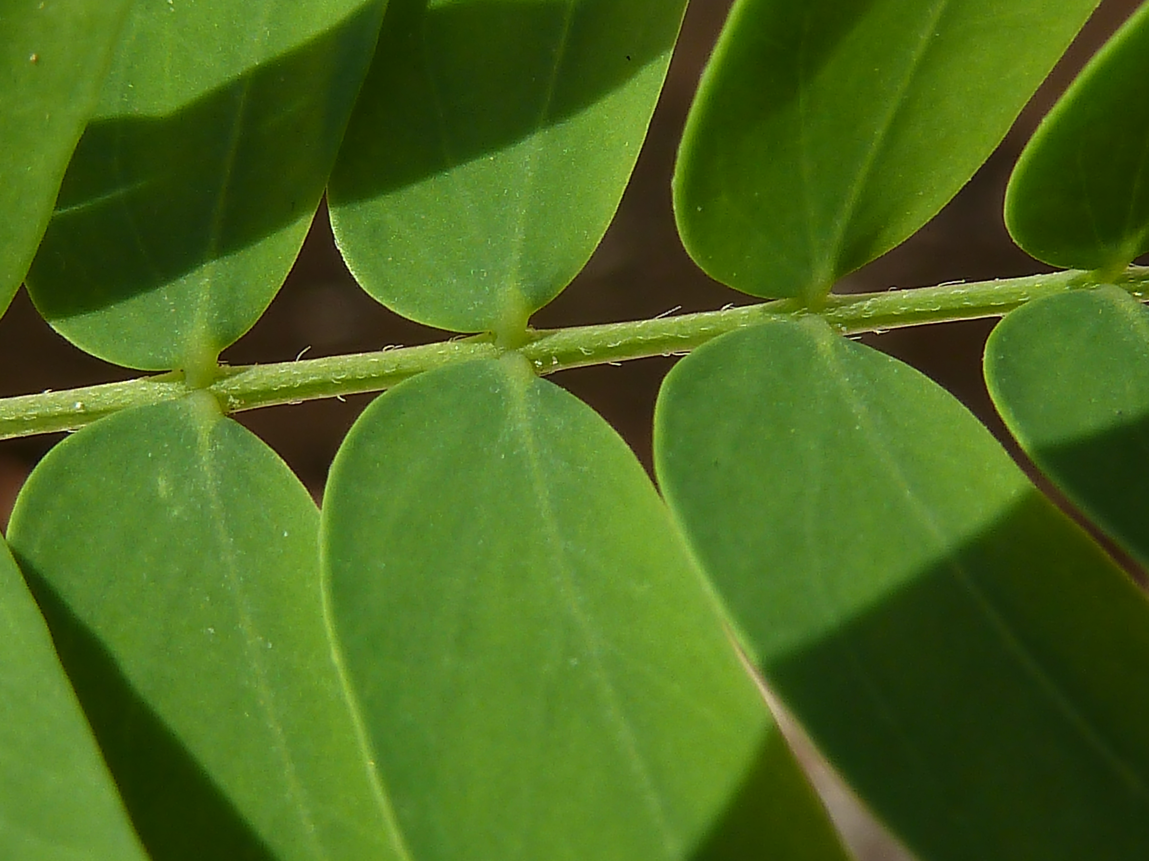 Leucaena leucocephala - Hoja bipinnada jóven: detalle de la inserción de los folíolos en la cara superior de un raquis secundario - Águilas (Murcia, España).